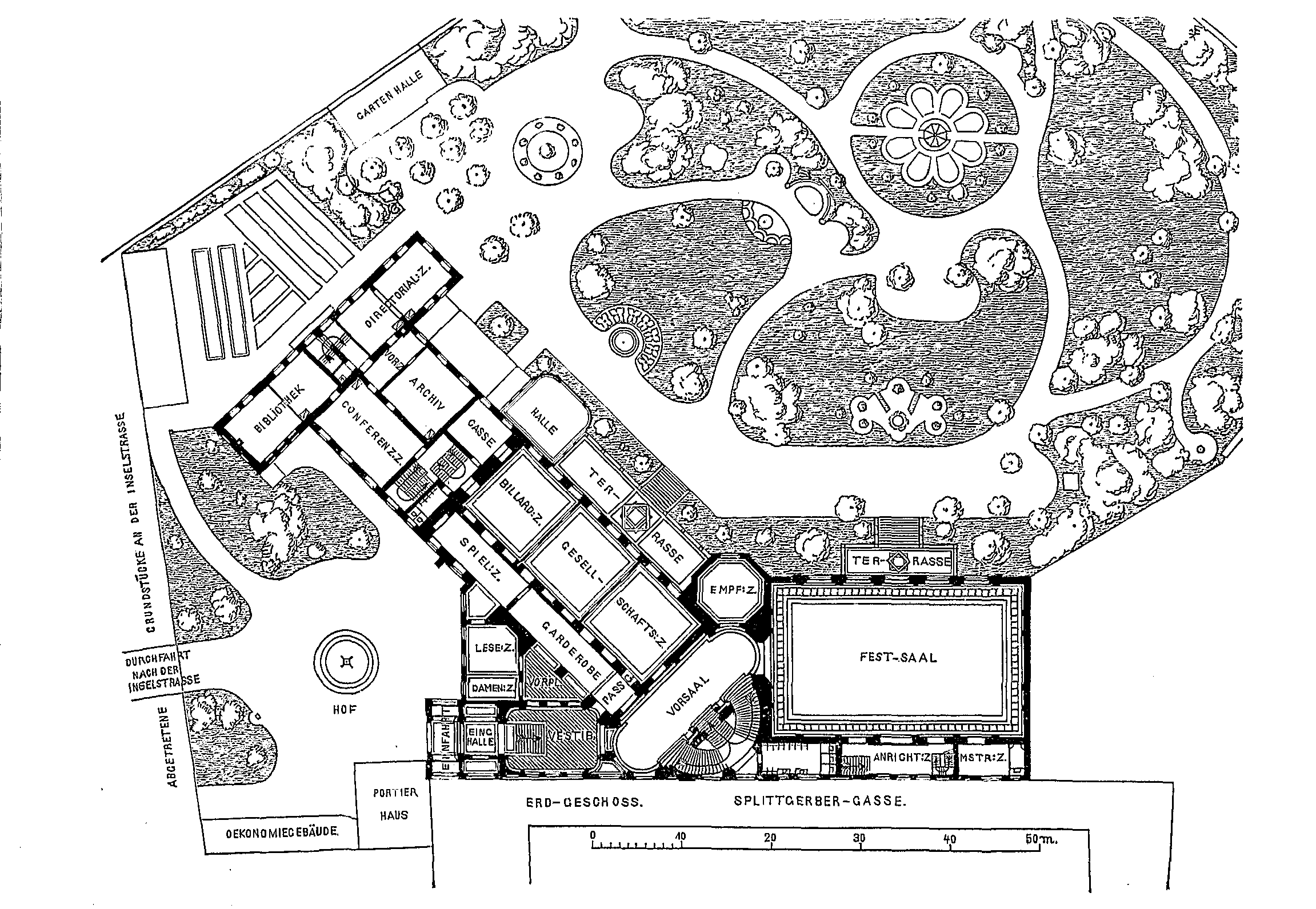 Grundriss Splittgerber Gasse 3, Logenhaus mit Garten